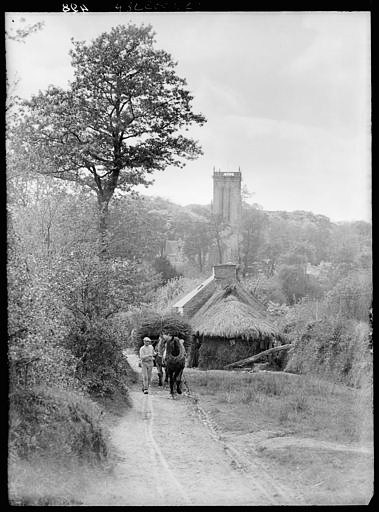 Paysan avec sa carriole devant le calvaire et l'église de Saint-Herbot (début XXe, Noël Le Boyer, base Mérimée)